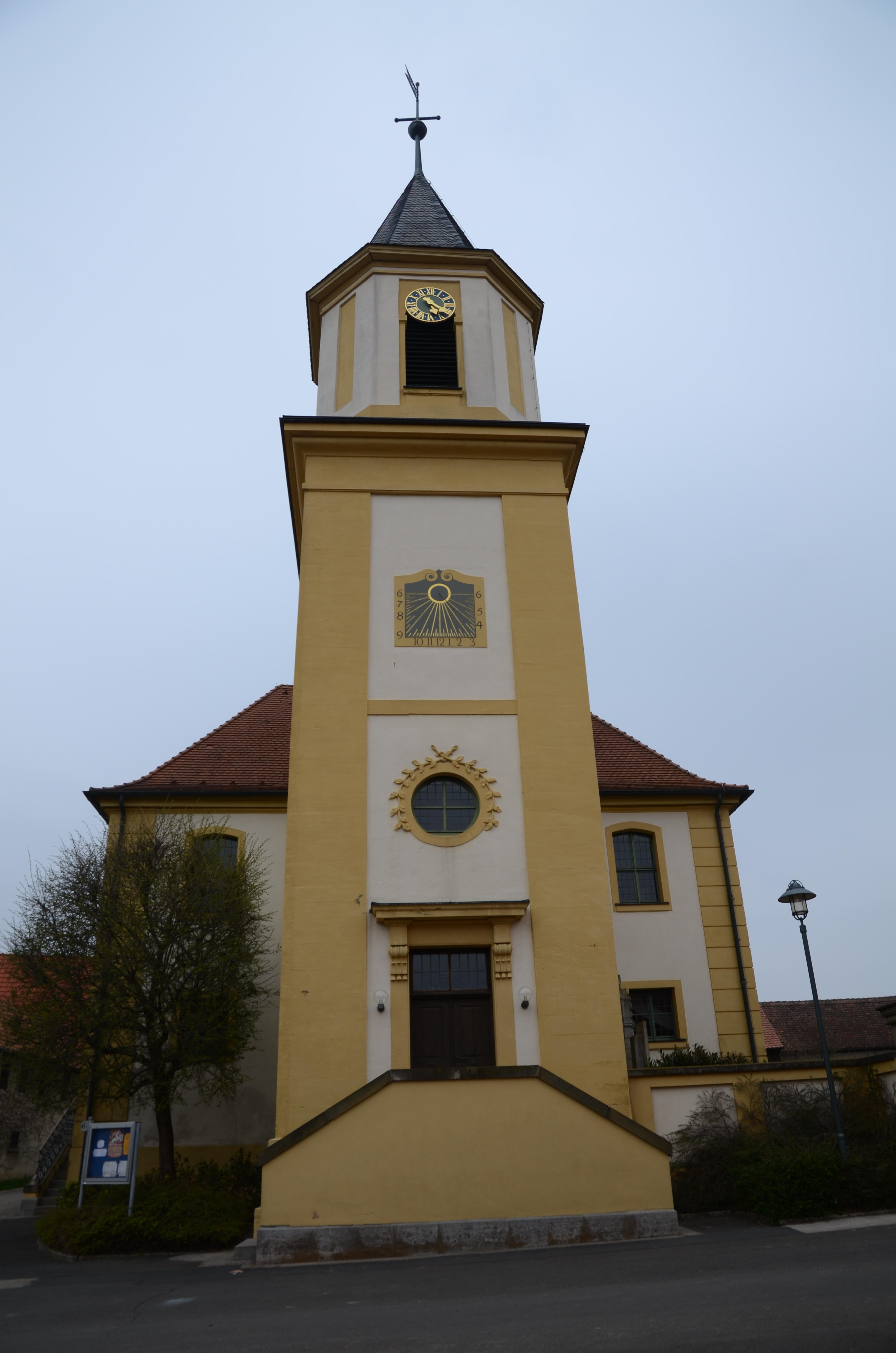 evang.-luth. Dreieinigkeitskirche in Rudolzhofen